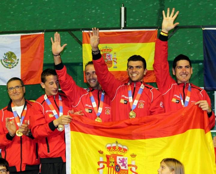 seleccion